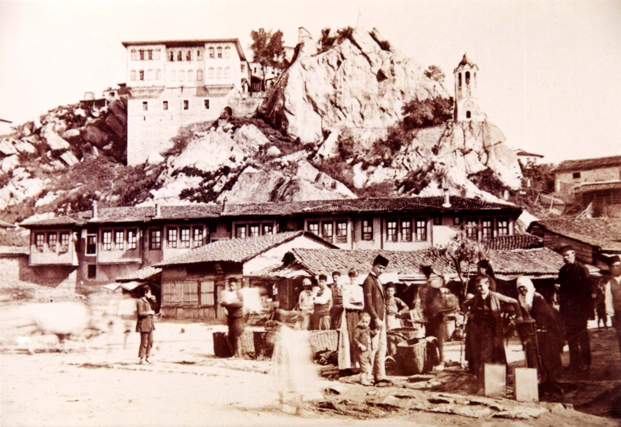 Джамбазтепе в Пловдив – фотография от албум, изготвен от Иван Карастоянов за цар Фердинанд във връзка с Първото българско изложение в Пловдив през 1892 г. Фотограф - Иван Карастоянов, София.